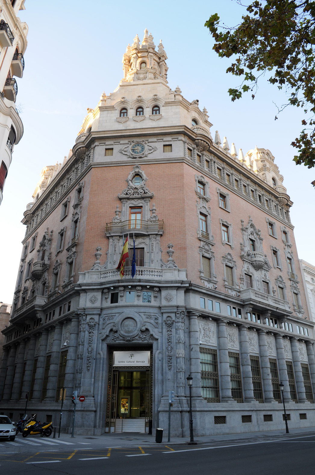 Edificio Glorieta